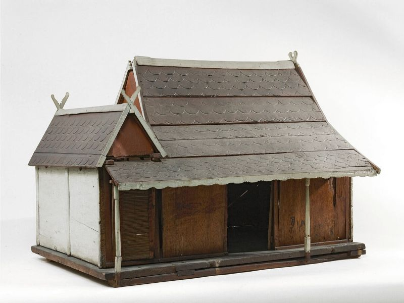 Huismodel. Model van een huis Unknown language: Rumah bangsal